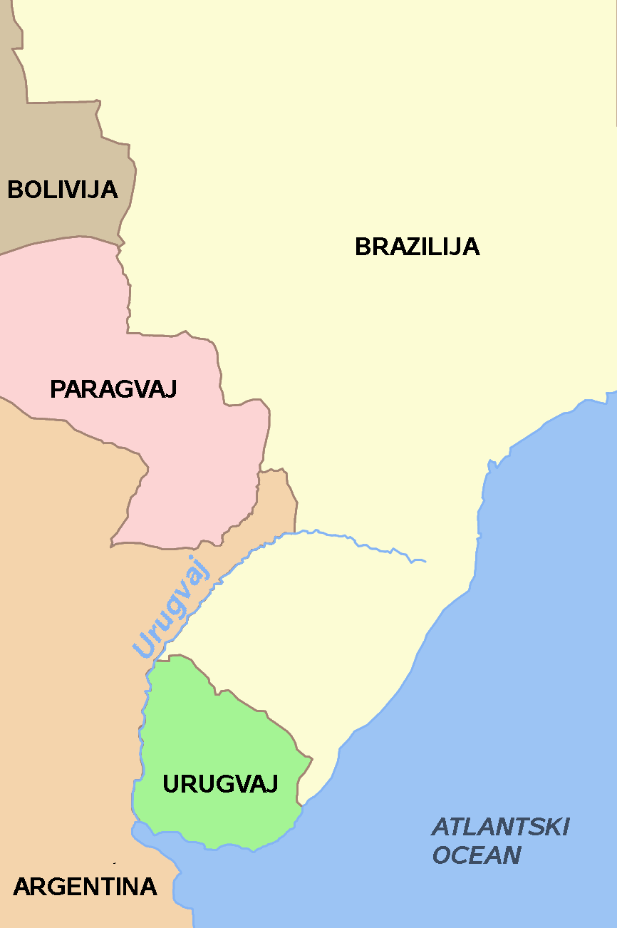 Zemljevid južnoameriške reke Urugvaj. Lstnoročno sem prevedel izvirni zemljevid v Zbirki